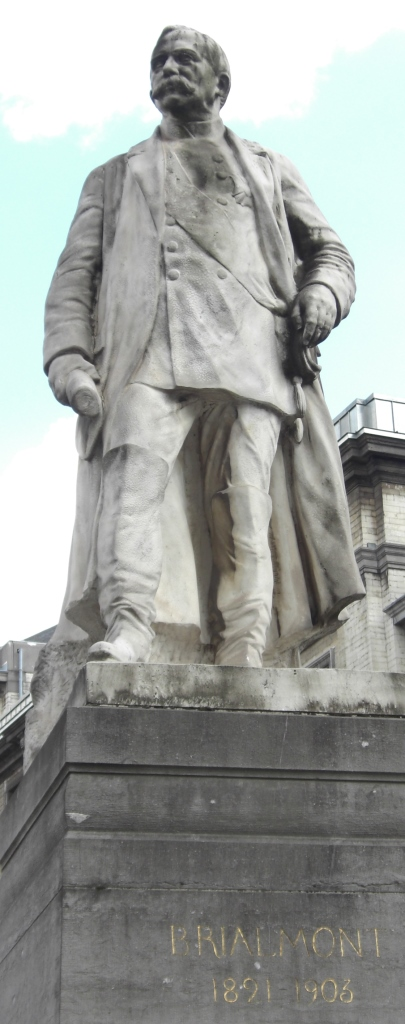 Statue des Generals und Militärschriftstellers Henri Alexis Brialmont (1821-1903) in Brüssel